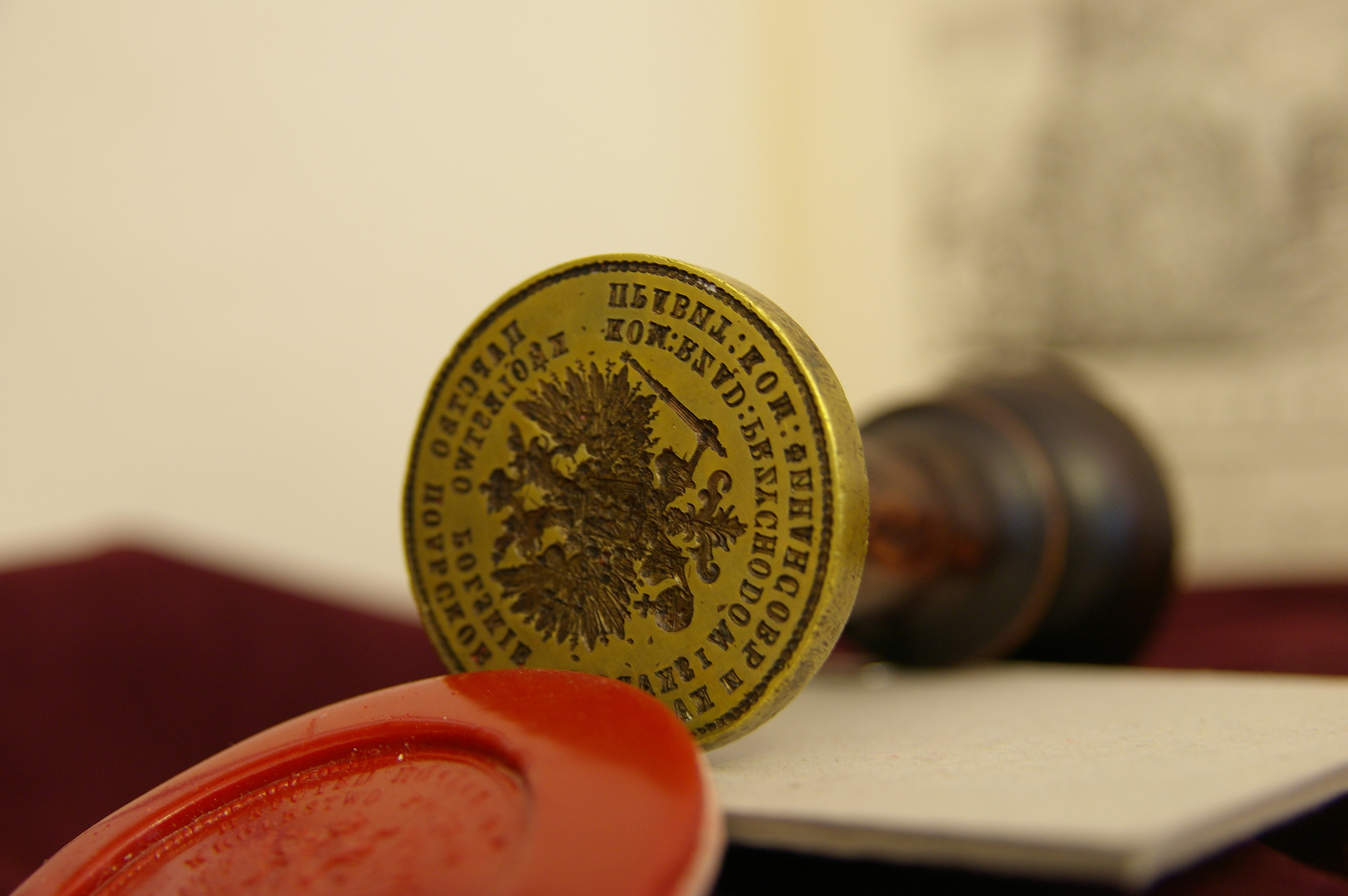 Pieczęć Franciszka Ksawerego Druckiego-Lubeckiego. Fotografia wykonana w czasie dni otwartych NBP w Łodzi.